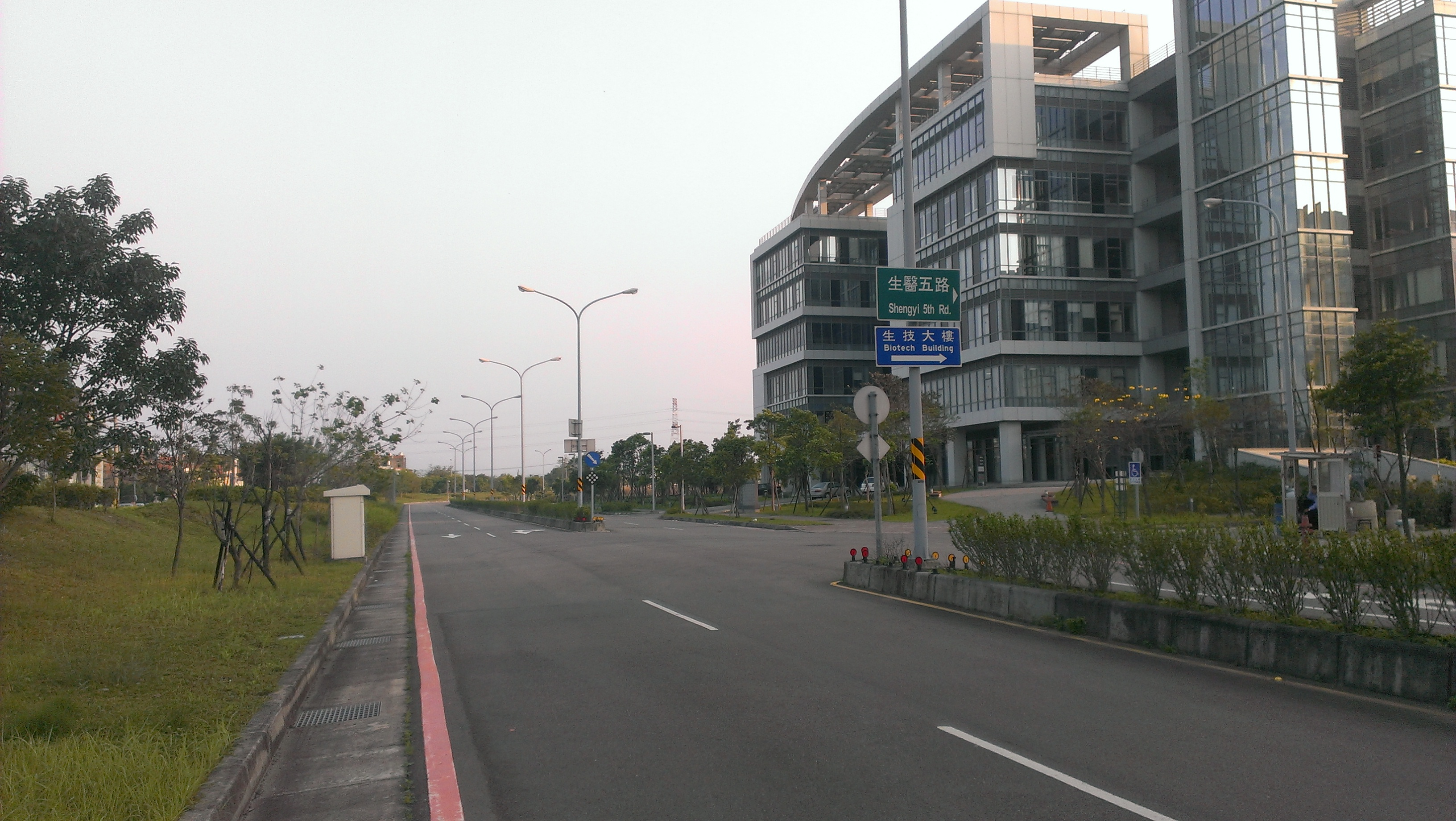 新竹生物醫學園區環境一